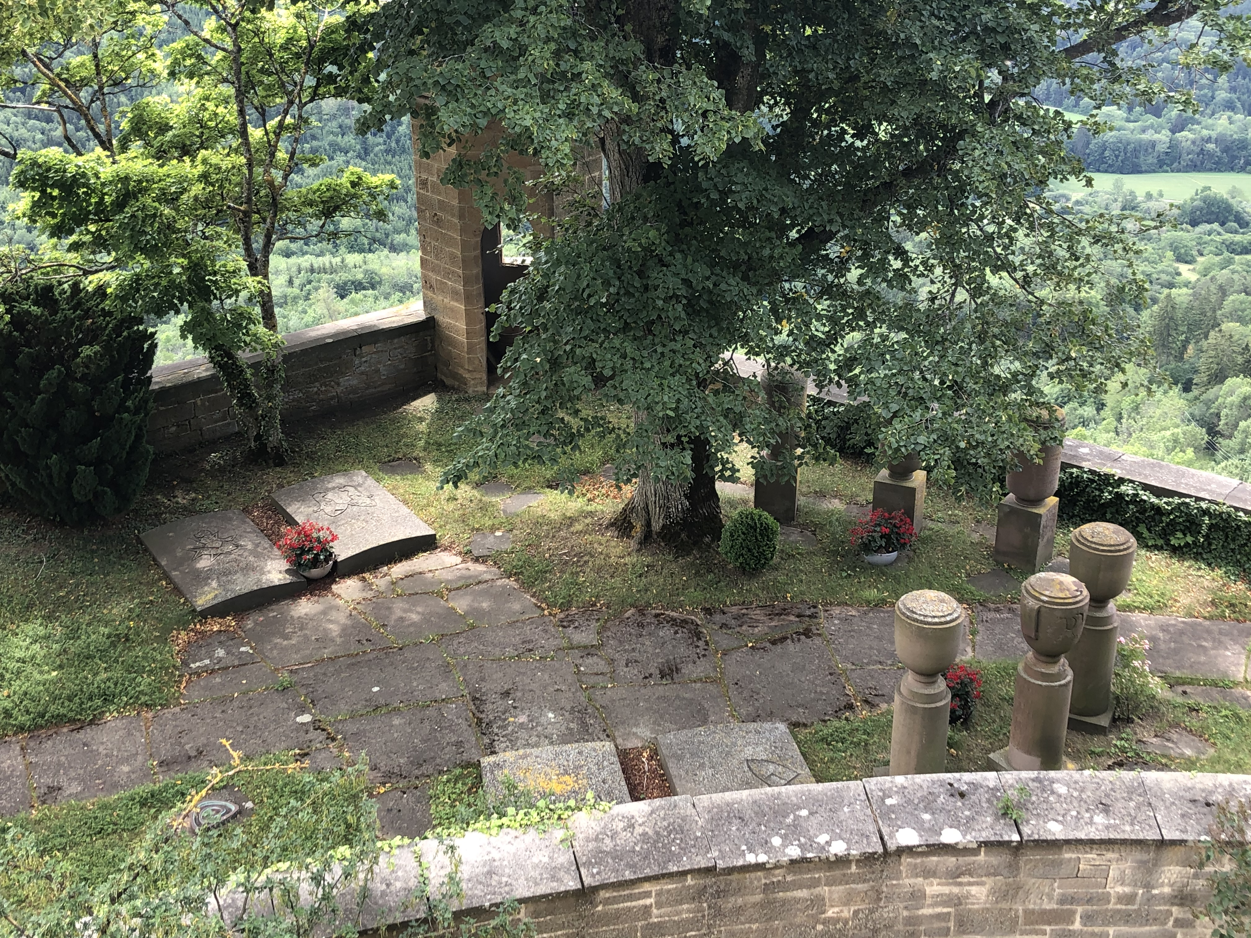 Burg Hohenzollern, Familienfriedhof im Offiziersgärtchen der St. Michaelsbastei